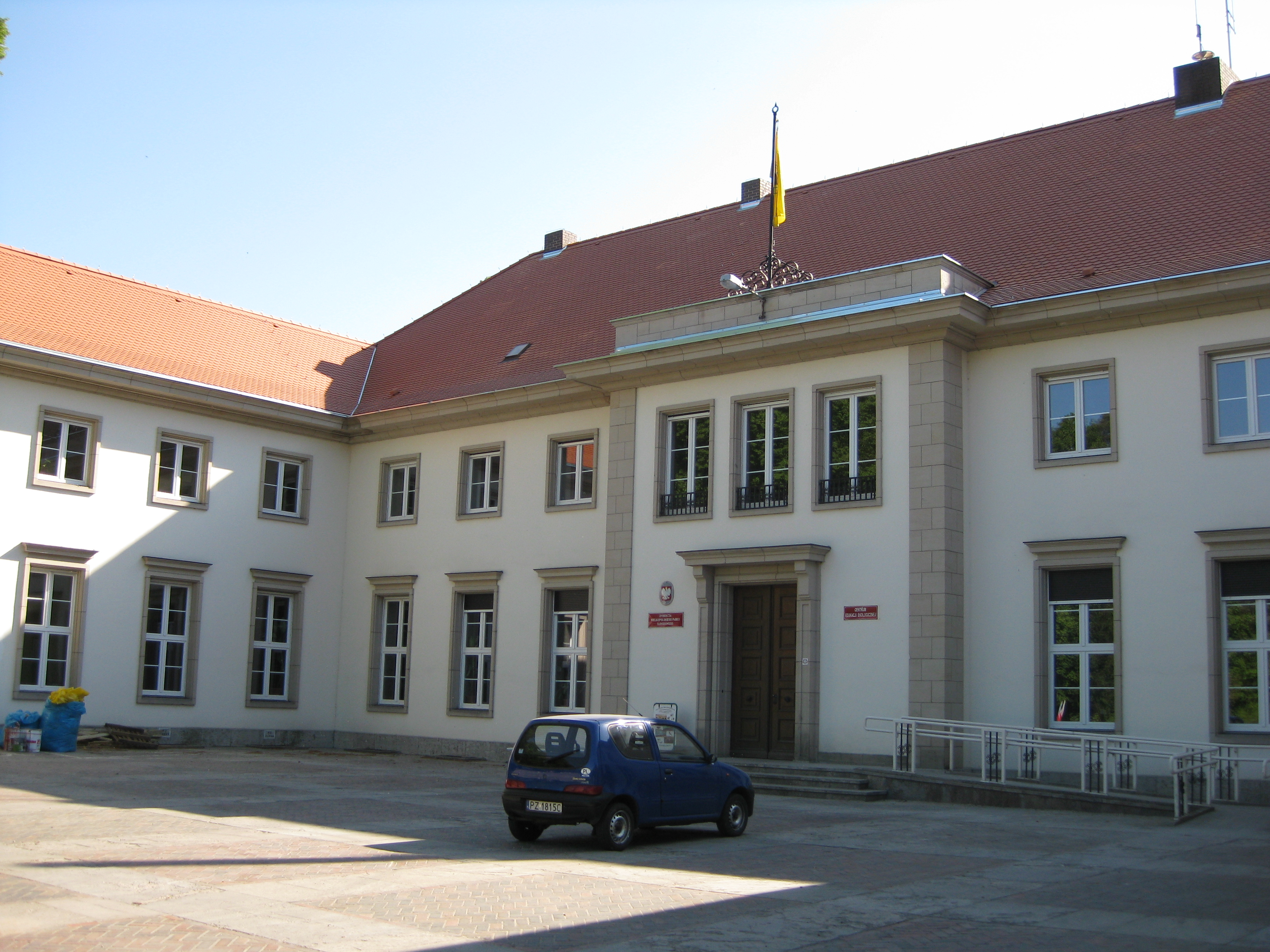 Dyrekcja Wielkopolskiego Parku Narodowego i Muzeum Przyrodnicze w Jeziorach (od frontu)